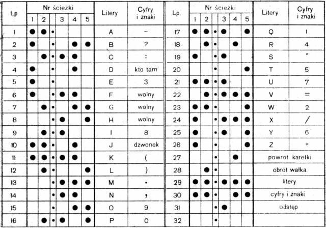 Międzynarodowy kod telegraficzny dla taśmy 5-dziurkowej